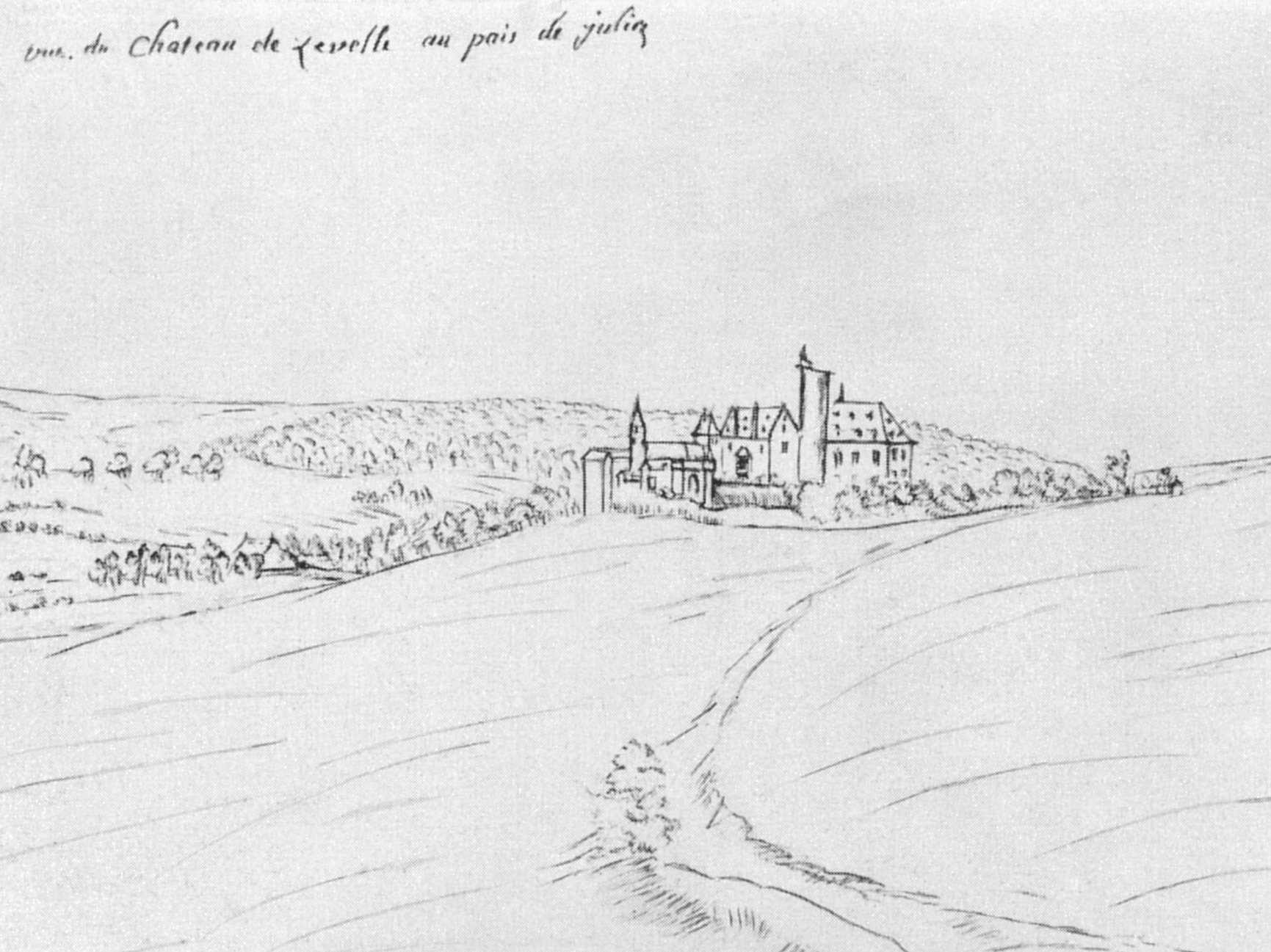 Zeichnung der Burg Zievel, Deutschland